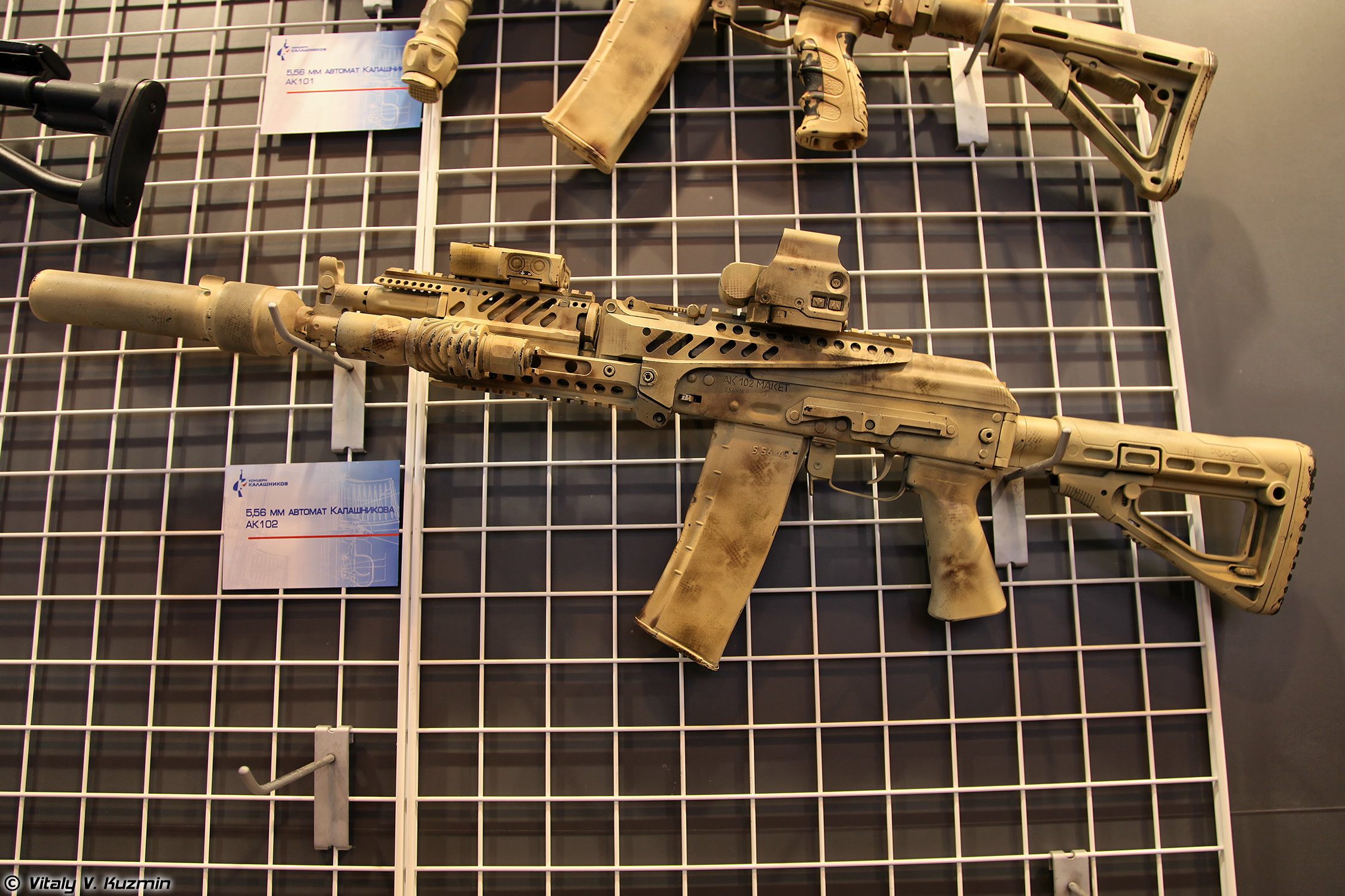 Автомат АК-102 (AK-102 assault rifle)